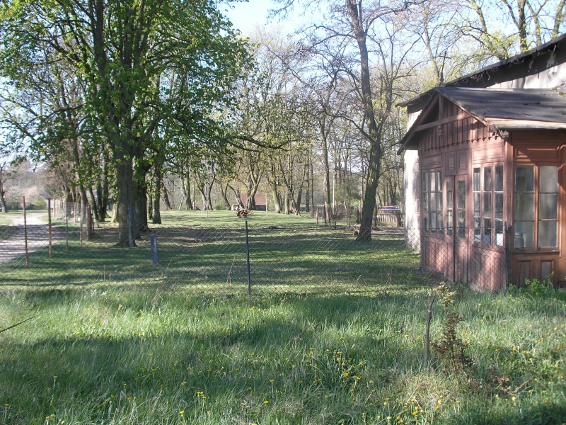 Machory. Ganek kaplicy dworskiej domu Dołęgów.